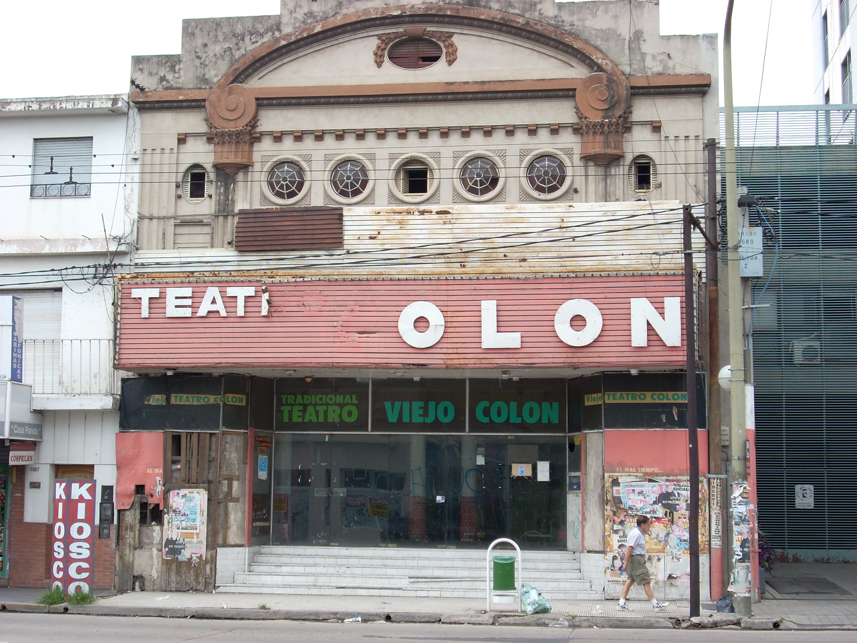 Teatro Viejo Colón, Barrio Alberdi, Córdoba, Argentina